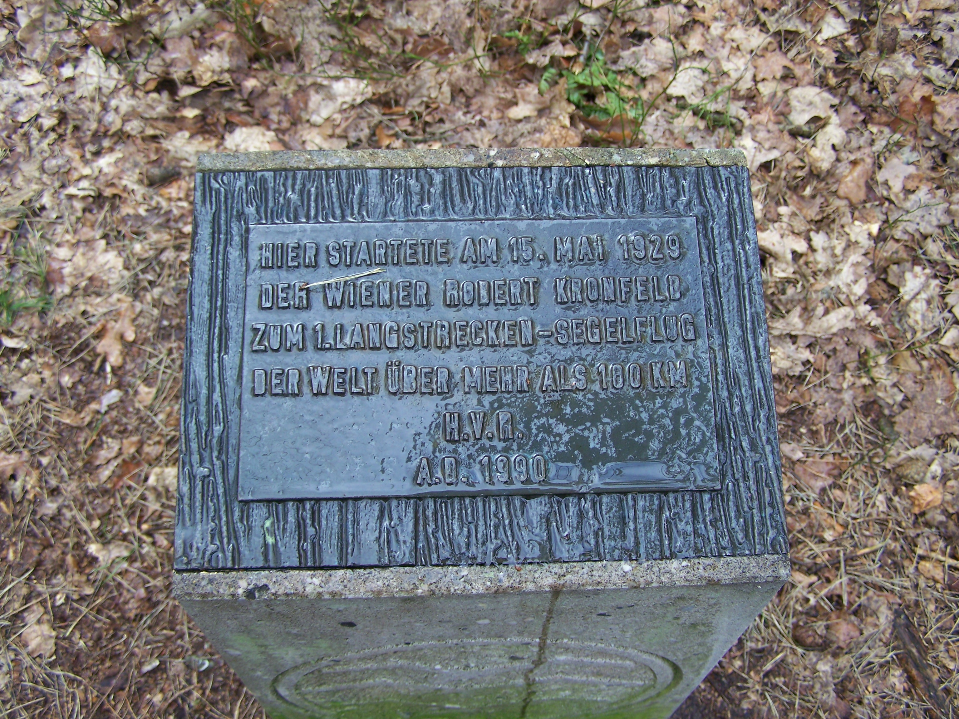 Gedenkstein 1.Segelflug über 100km am Bergeshöveder Berg